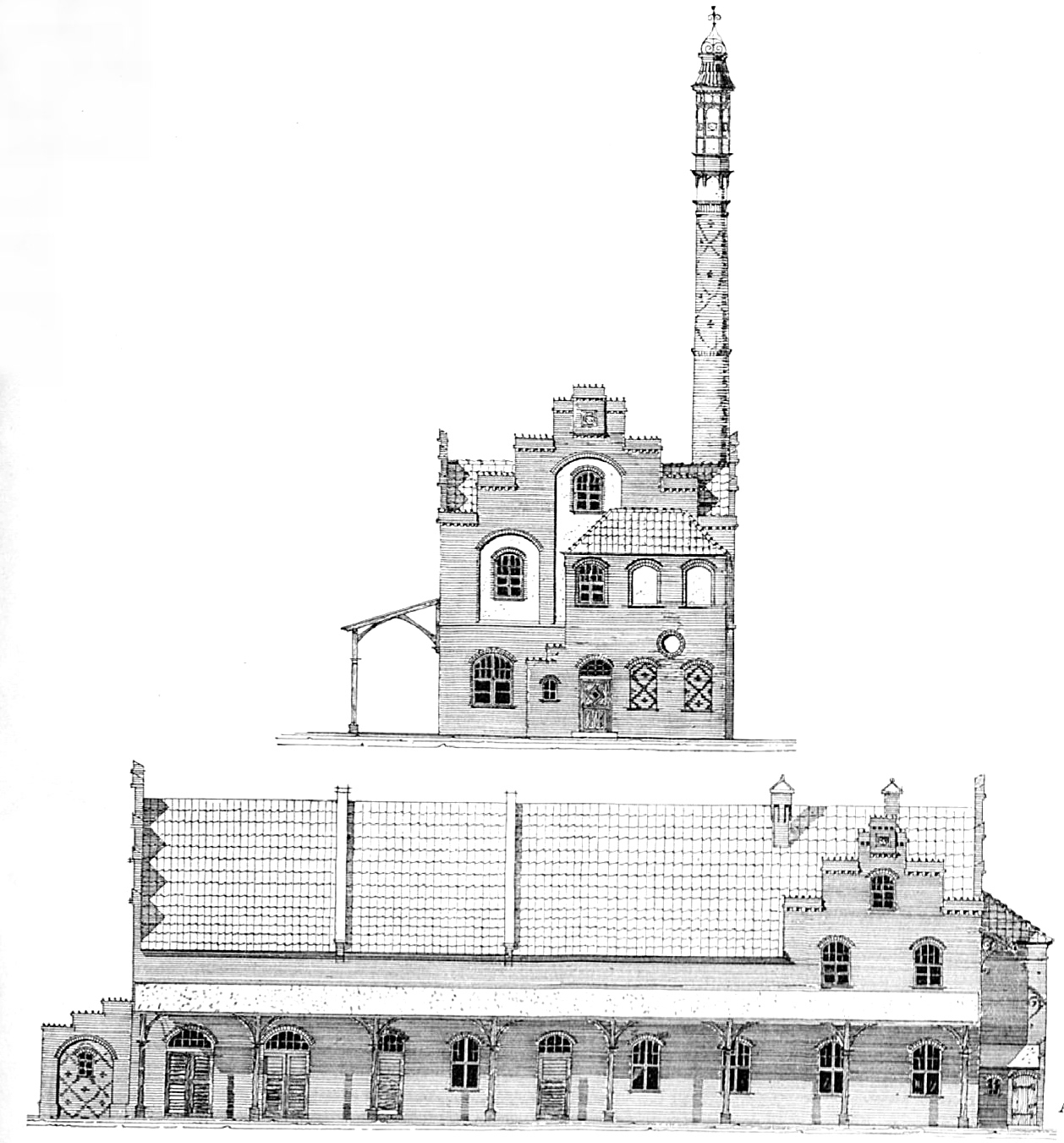 Schloss Wiligrad, Maschinenhaus